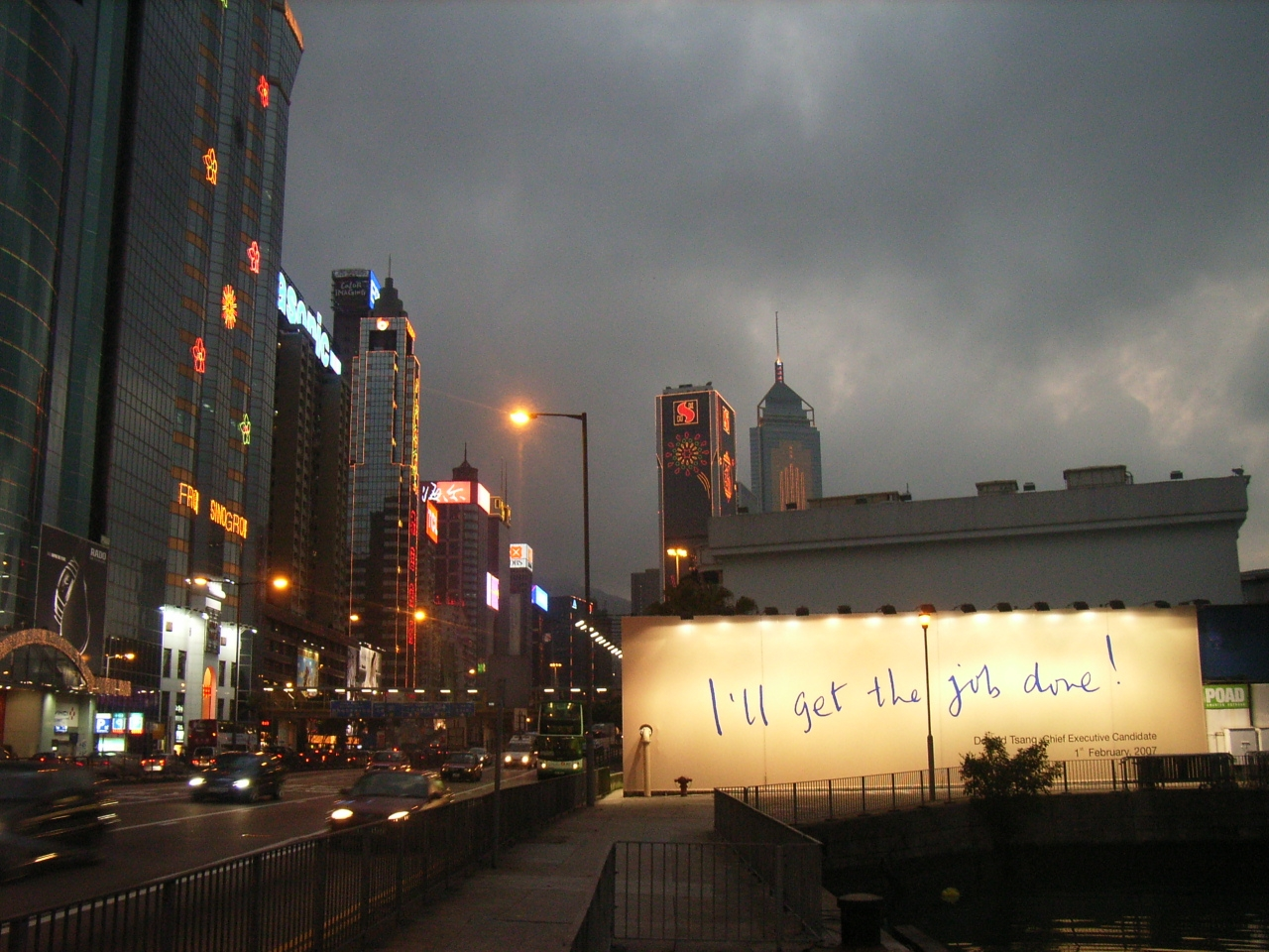 An evening view at Causeway bay, Hong Kong User:Vday's Photo taking.